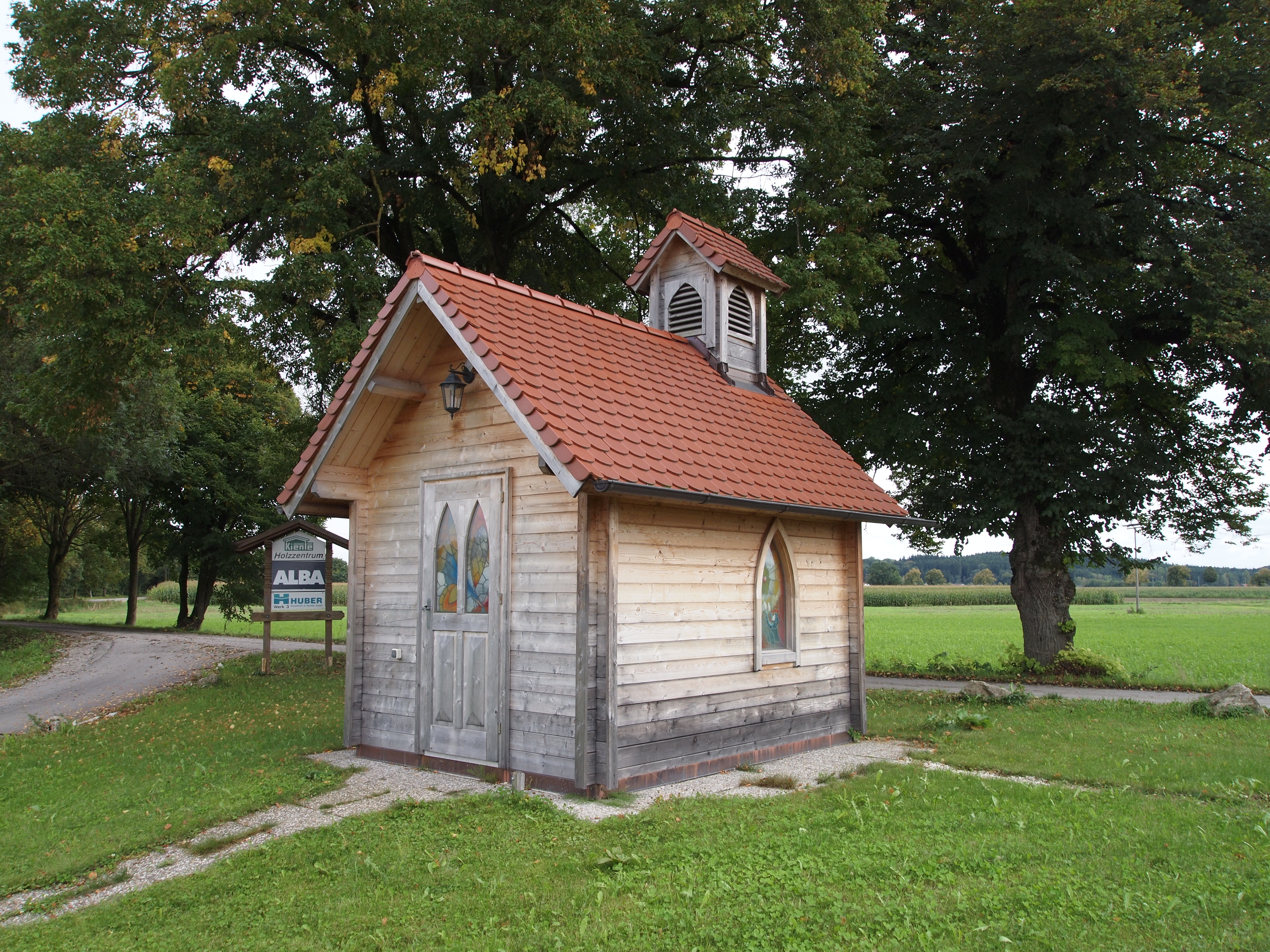 Herz-Jesu-Kapelle in Wiedergeltingen am Zugang zur ehemaligen Mühle der Familie Kienle, An der Mühle 1.